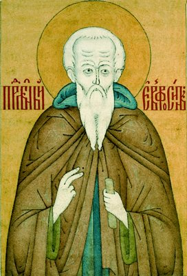 Прп. Евфросин Псковский. Акварельный рисунок из сборника служб и житий. Нач. XVIII в. (БАН. Собр. Ф.М. Плюшкина. № 164. Л. 43 об.)